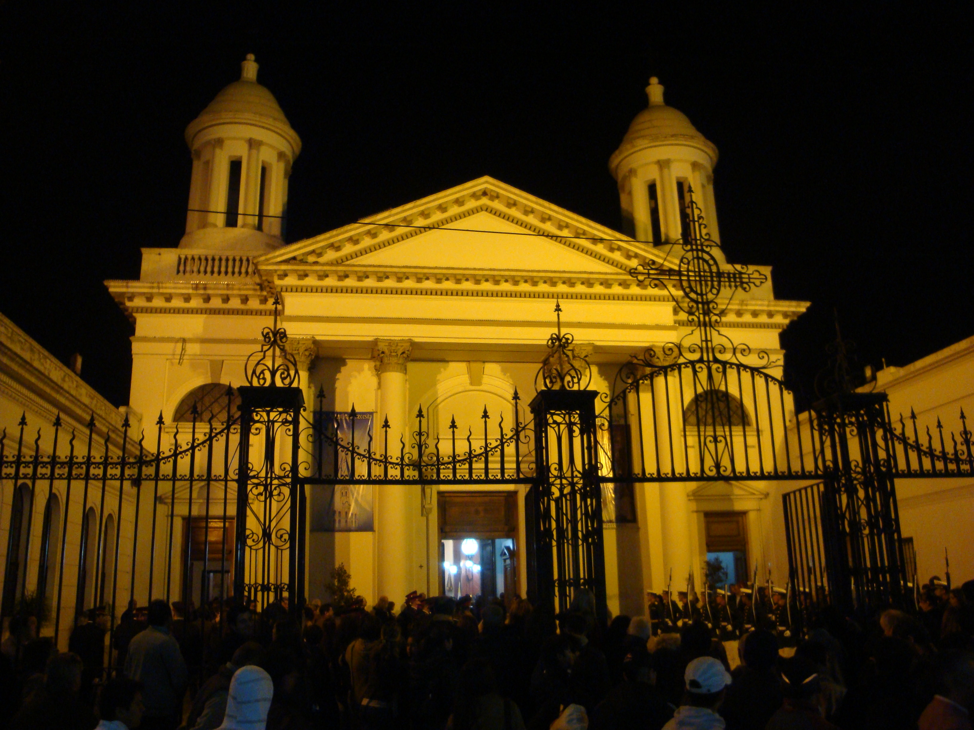 Acto por el 150º aniversario de la fundación del Partido de Lomas de Zamora. Vista de la Catedral Nuestra Señora de La Paz, donde se ofreció una misa.